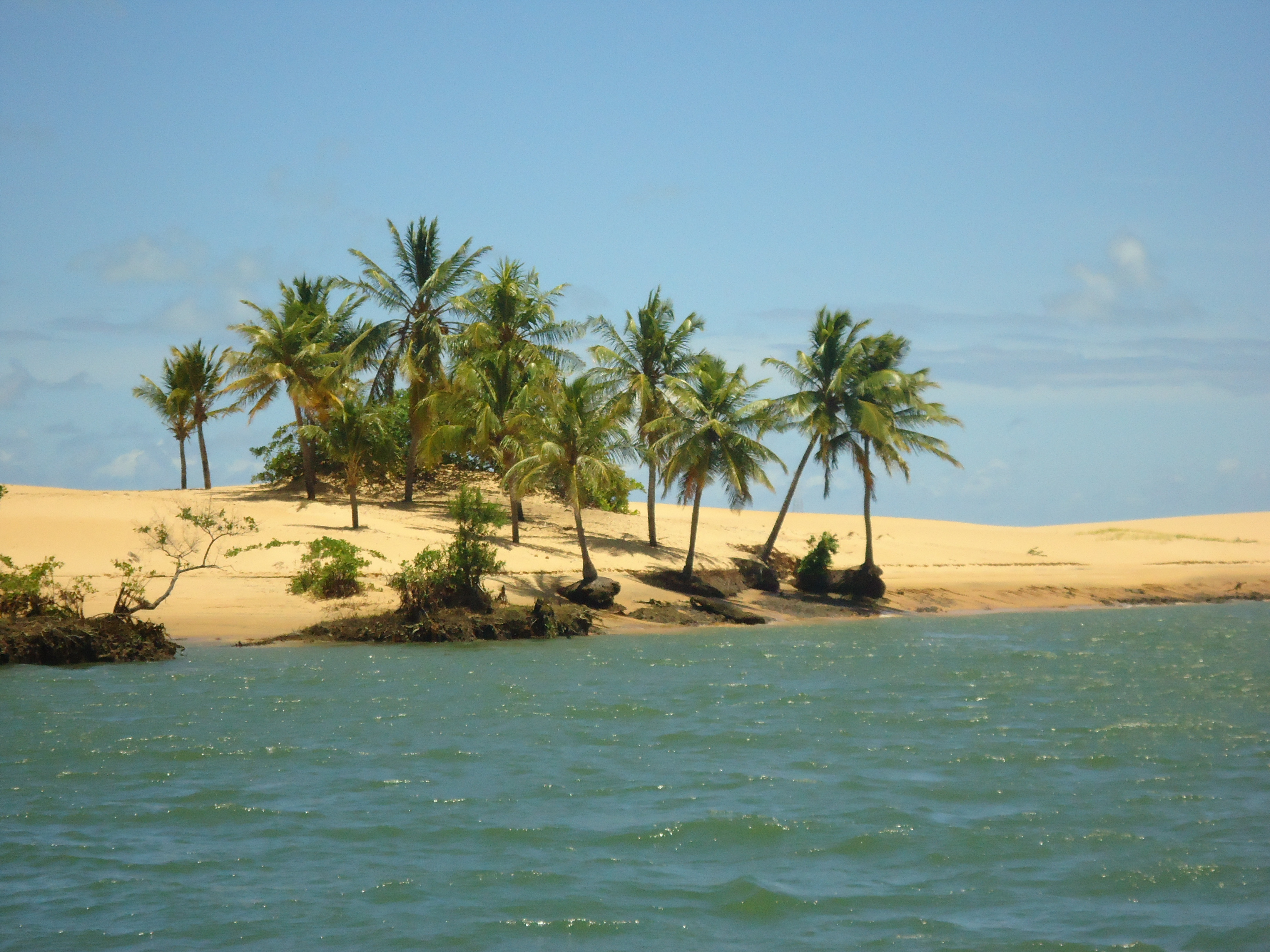 Vista do Pontal do Peba, Al, onde o velho Chico encontra o mar.